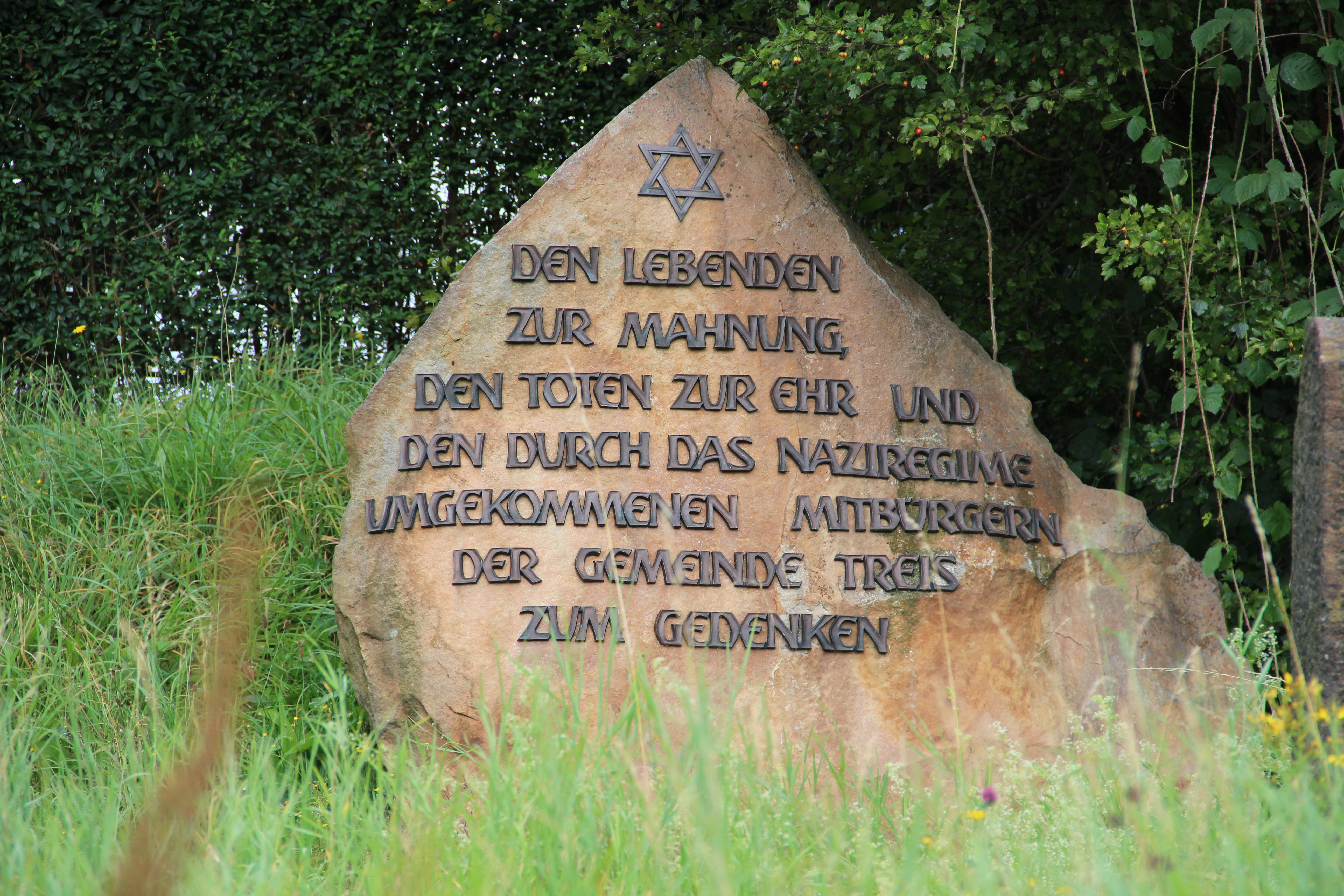 Jüdischer Friedhof in Treis a.d.L.